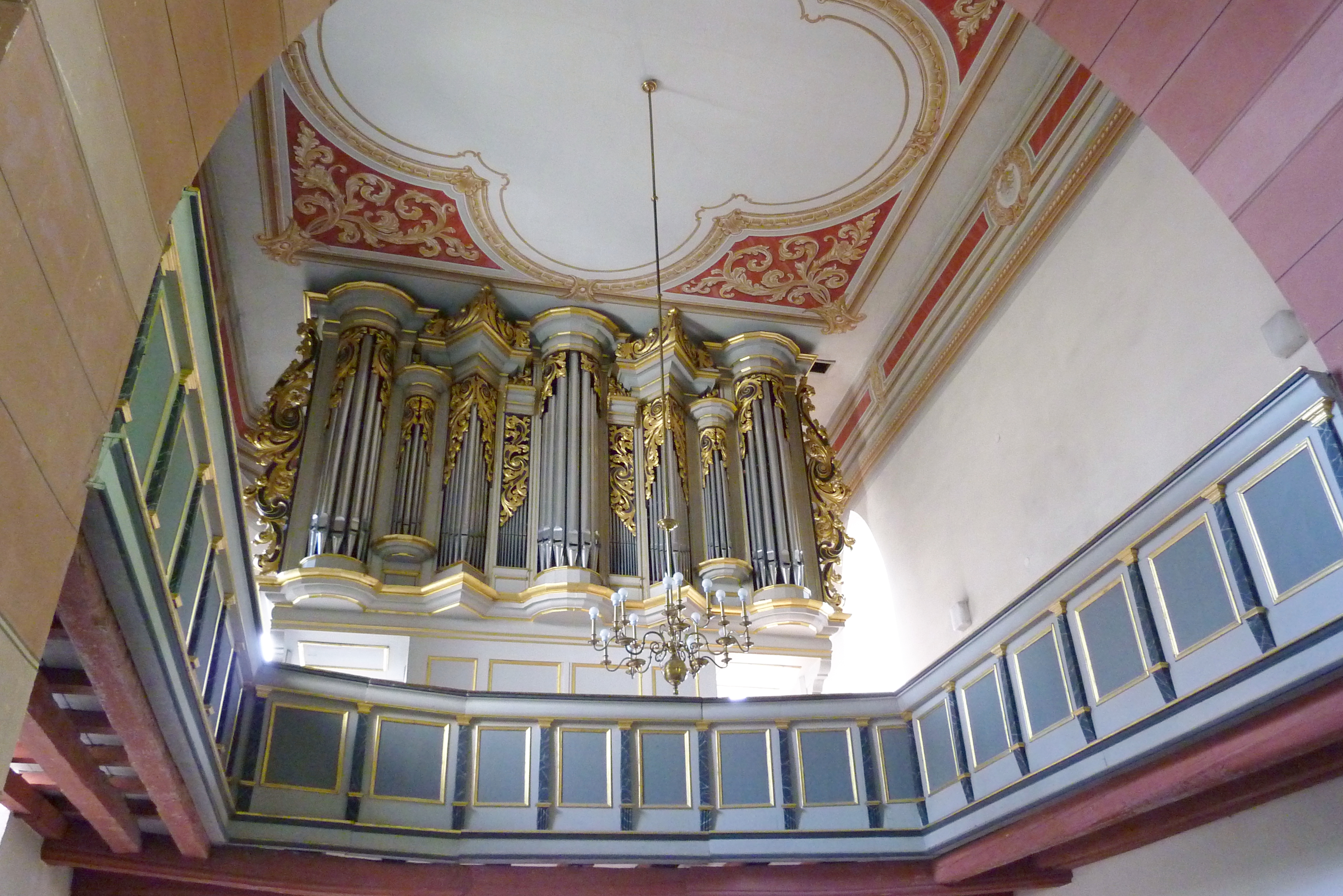 Evangelische Pfarrkirche in Usingen im Hochtaunuskreis (Hessen), Kirchgasse